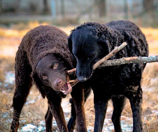 Курчавошёрстные ретриверы